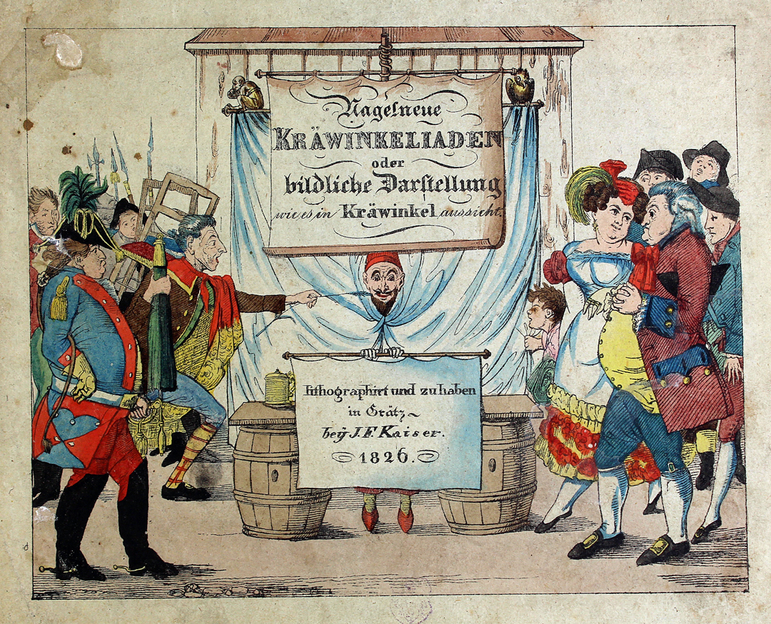 "Nagelneue Kräwinkeliaden", handkolorierte Feder-Lithographie ca. 15 x 18,5 cm, J. F. Kaiser, Graz 1826